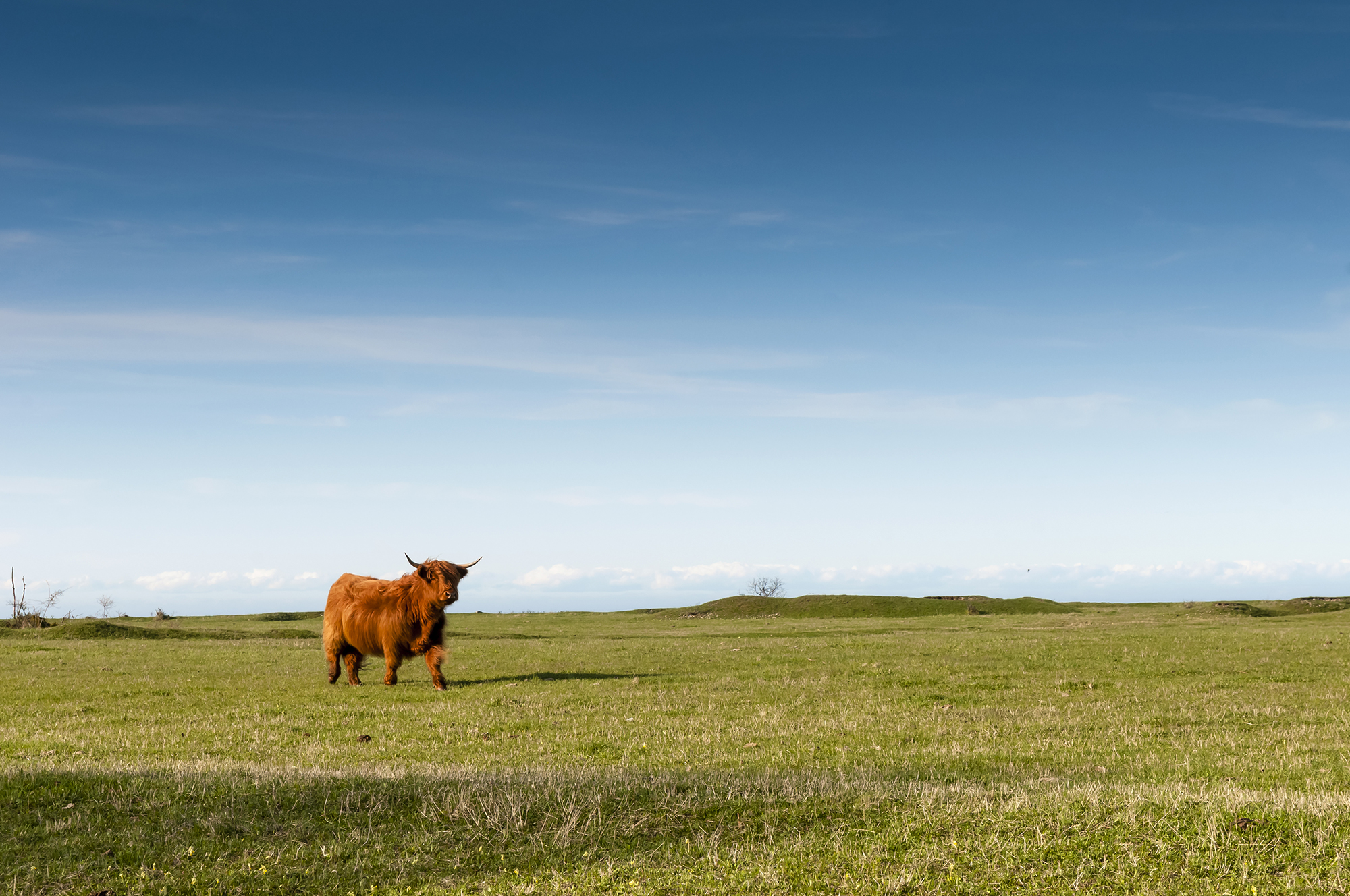 Osmussaare keskosa maastik. Šoti mägiveis.